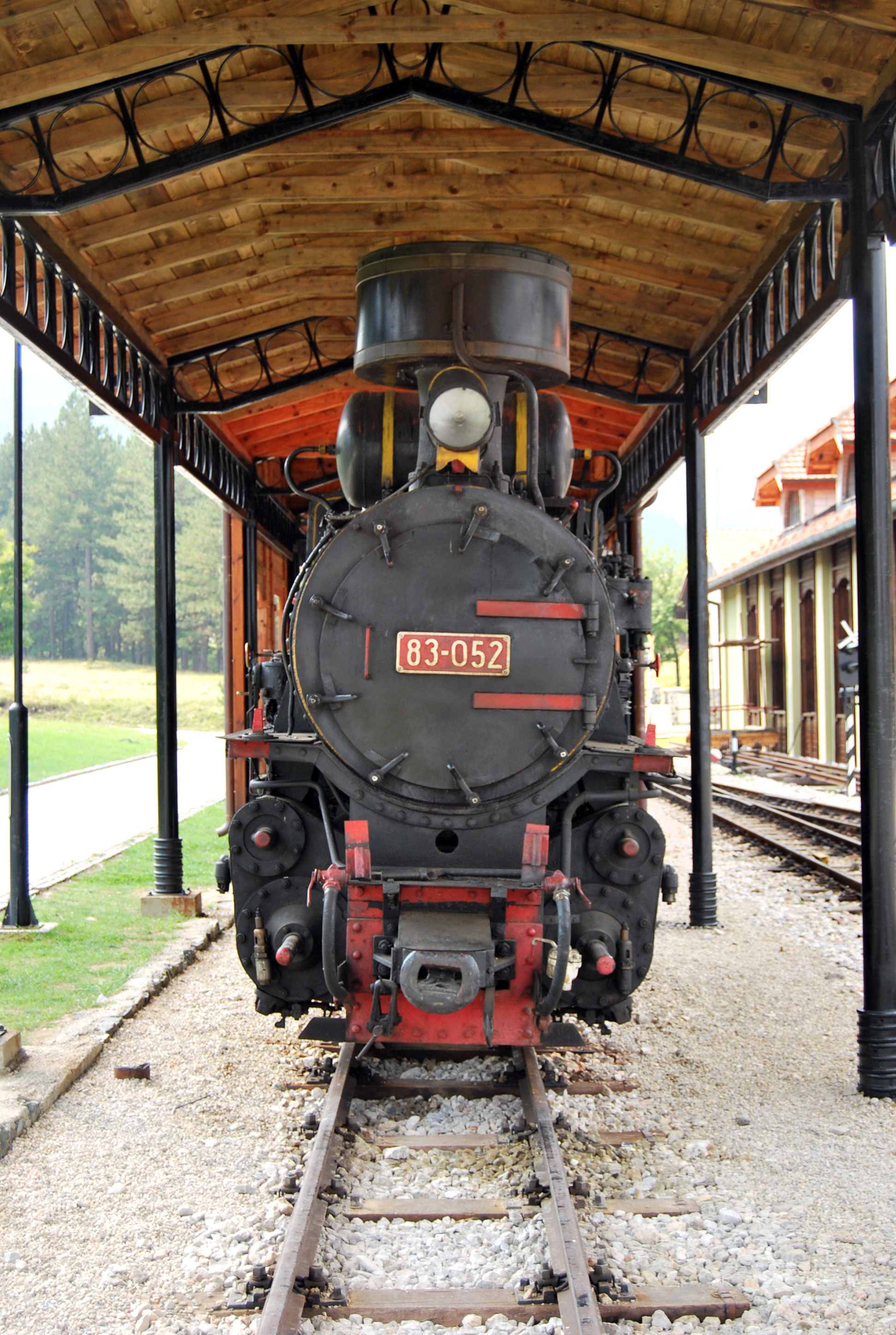 Šarganska osmica locomotive,Serbia.